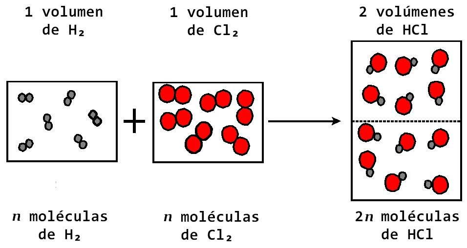 Esquema de la reacción de síntesis del HCl.